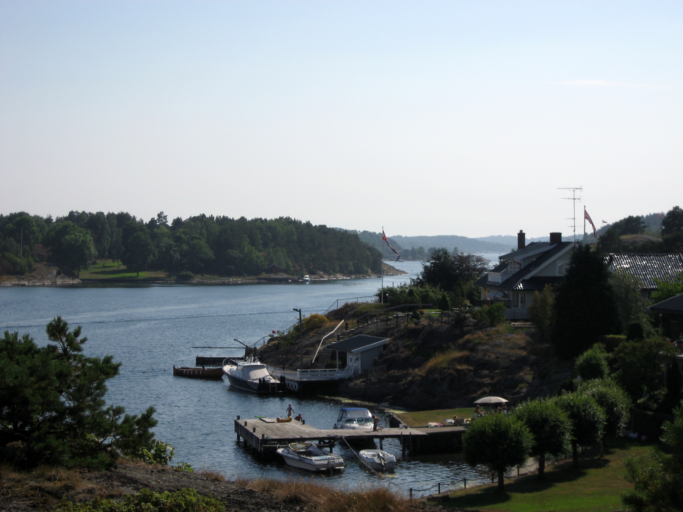 Årøysund of Nøtterøy! Photo taken by Minto